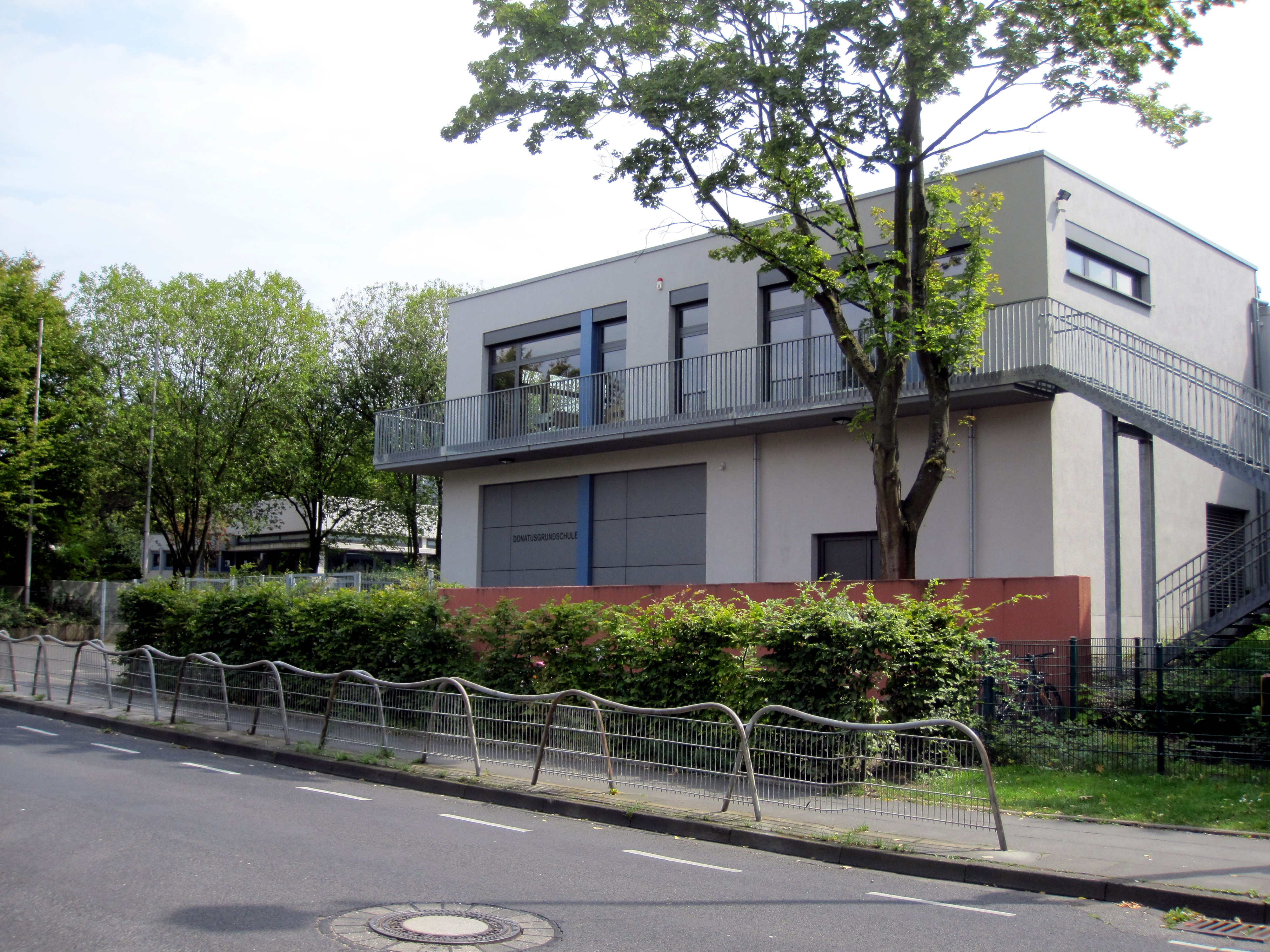 Liblar Donatusgrundschule